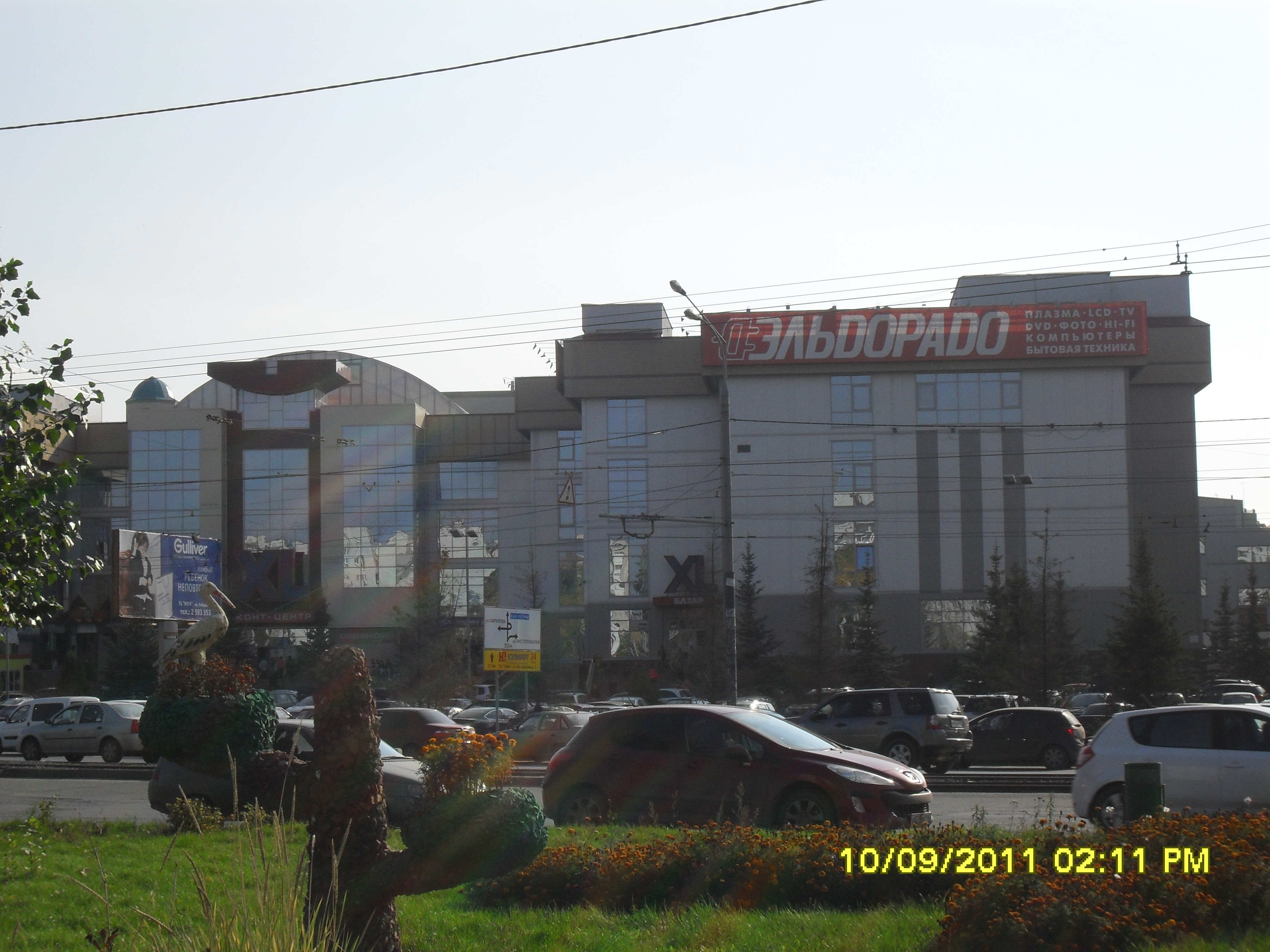 проспект Ямашева, гипермаркет ИкЭль